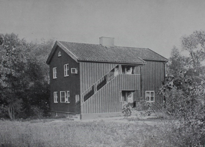 Statarebostäder med lofttrappa vid Åkeshovs slott, Bromma. Statarstugan vid Åkeshov låg på östra sidan om stigen nära Åkeshovs slott. Den byggdes troligen 1725 och brann för ett antal år sedan (omkring år 2000). Stugan hade loft och en utvändig lofttrappa. Den hörde under Åkeshov.